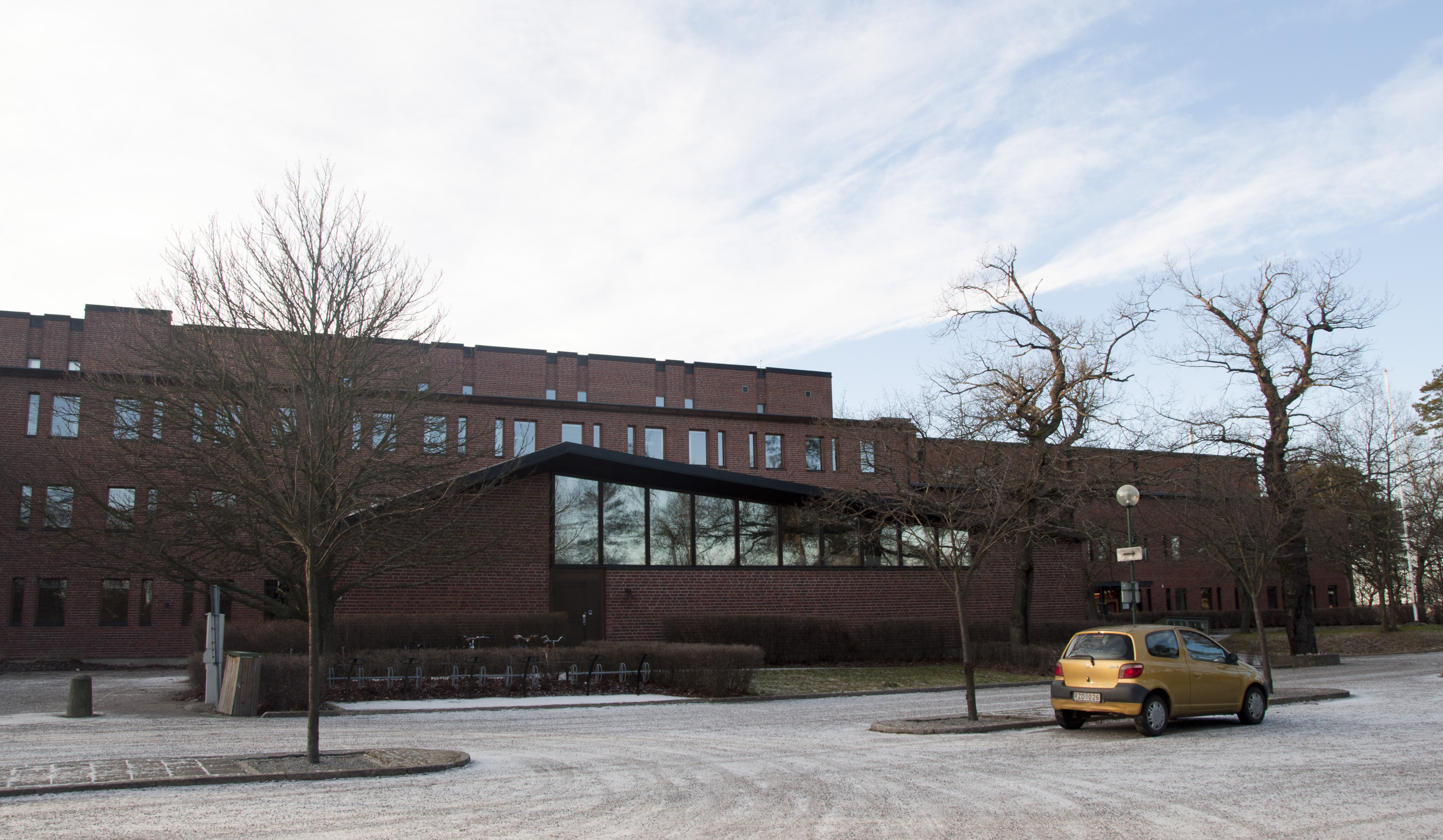 Botaniska institutionen vid SU. Byggår 1961-62. Arkitekt Lars Myrenberg